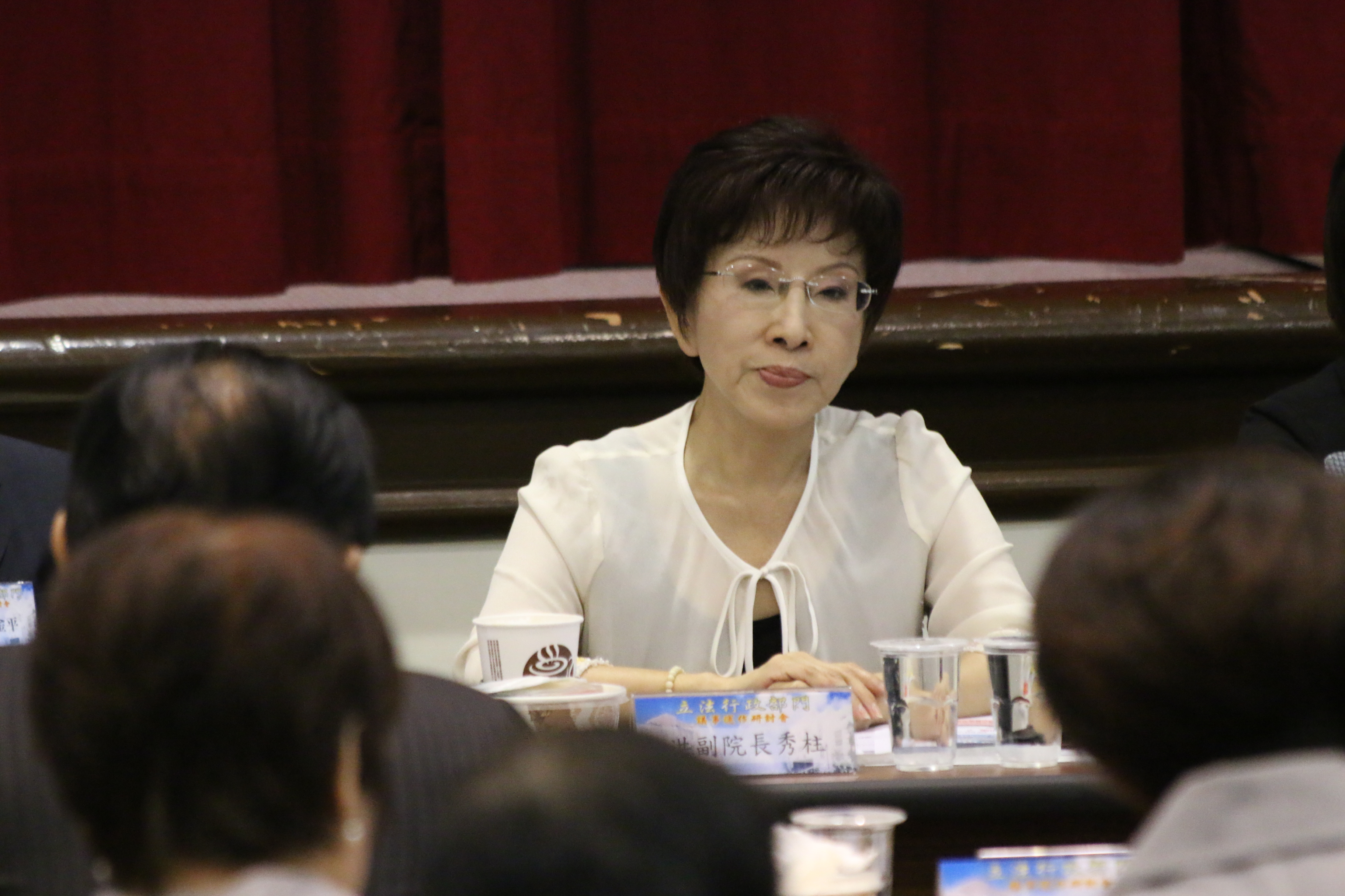 中文（台灣）: 國民黨總統候選人洪秀柱(美國之音楊明)